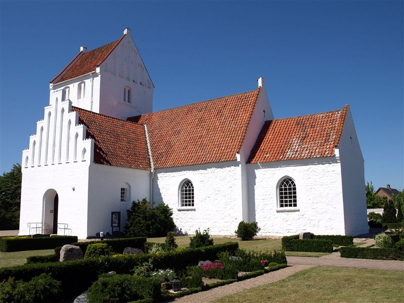 Gørlev Kirke i Danmark. Gørlev kirke